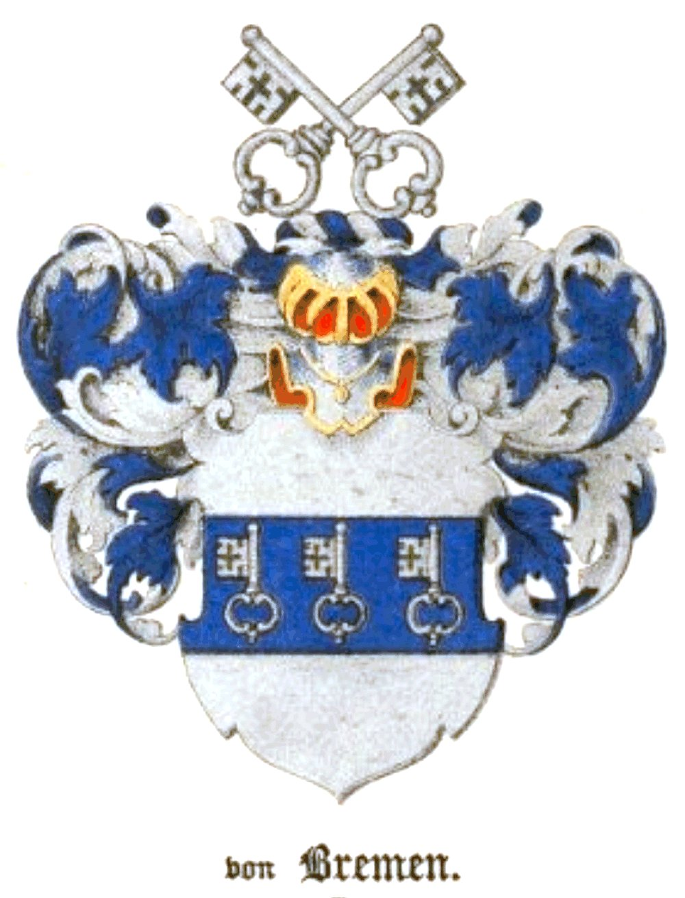 Bremeni suguvõsa aadlivapp